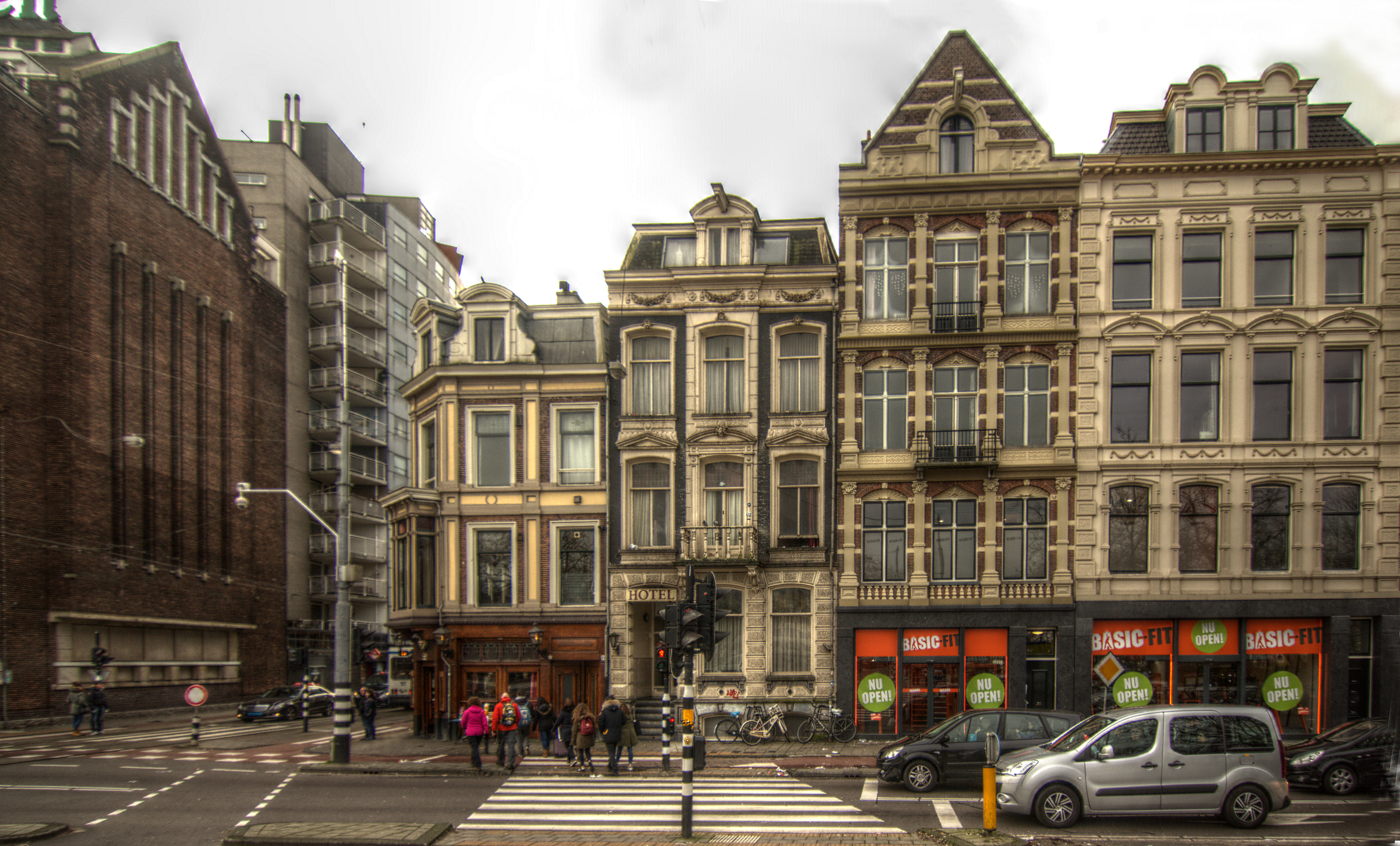 Gebouwen aan de Stadhouderskade te Amsterdam. Geheel links de voormalige Heineken brouwerij.